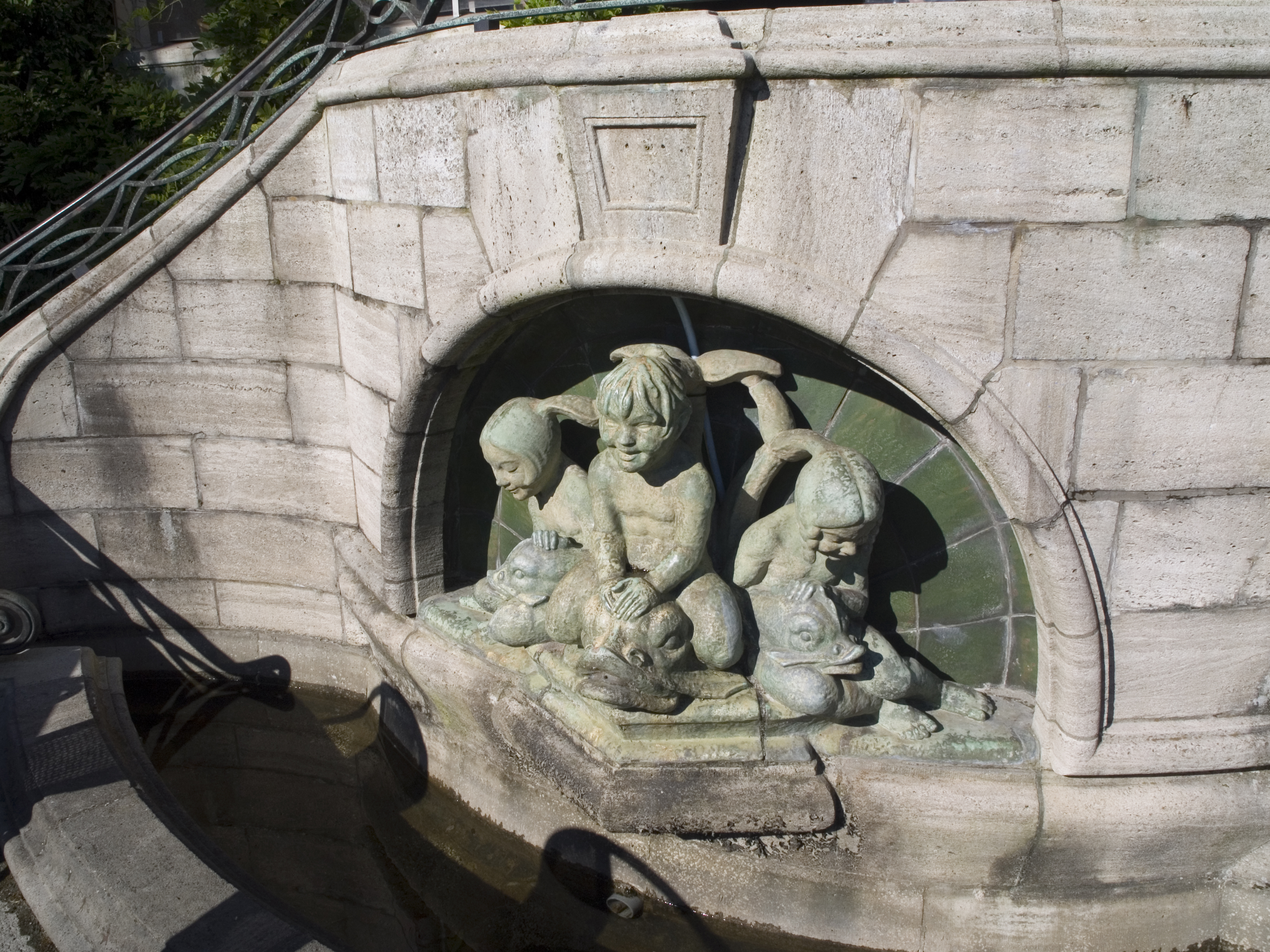 Северный Рейн-Вестфалия, Мюльхайм-на-Руре - замок Штюрум